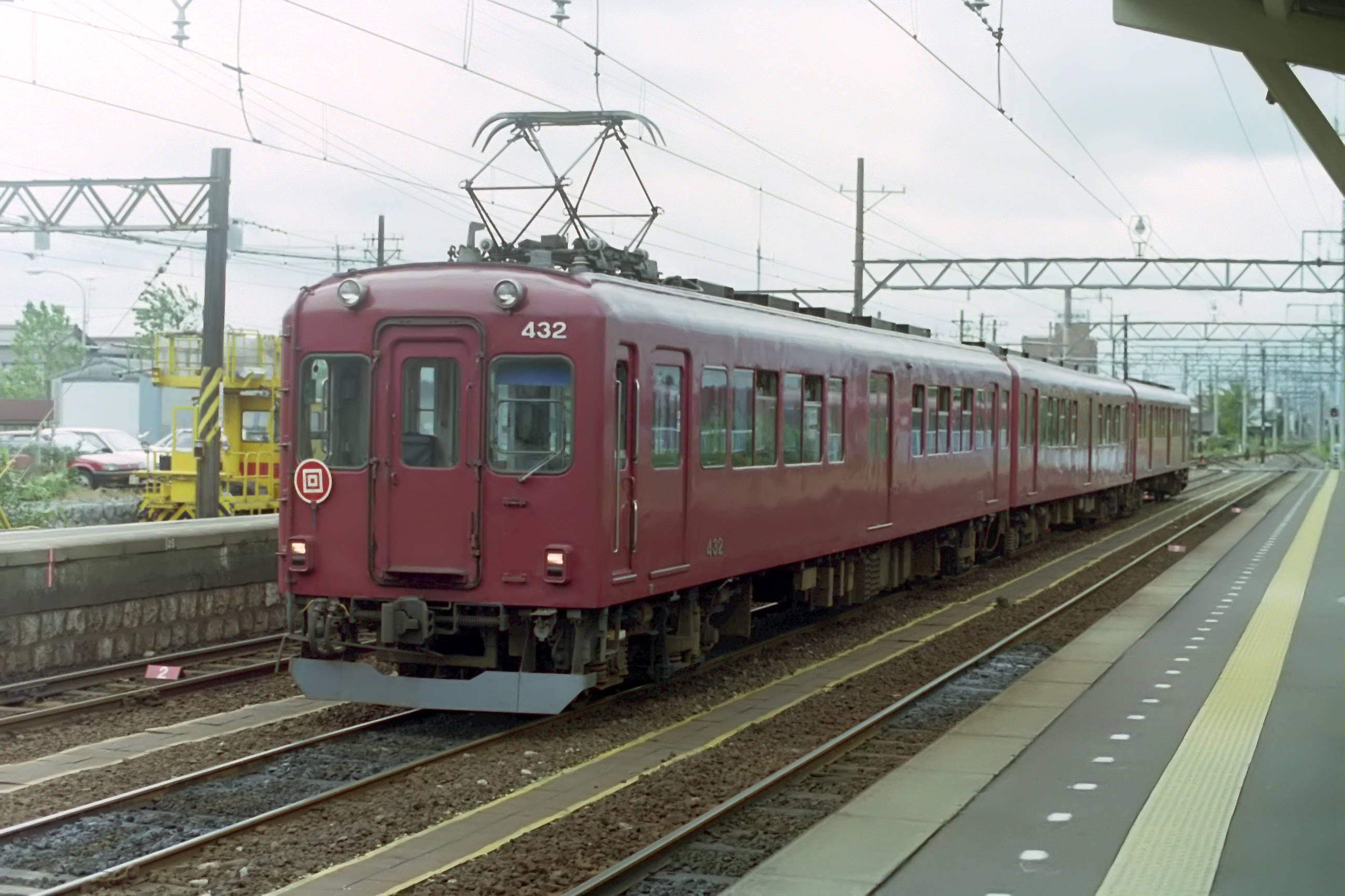 近鉄 モ432 1992年西大垣駅